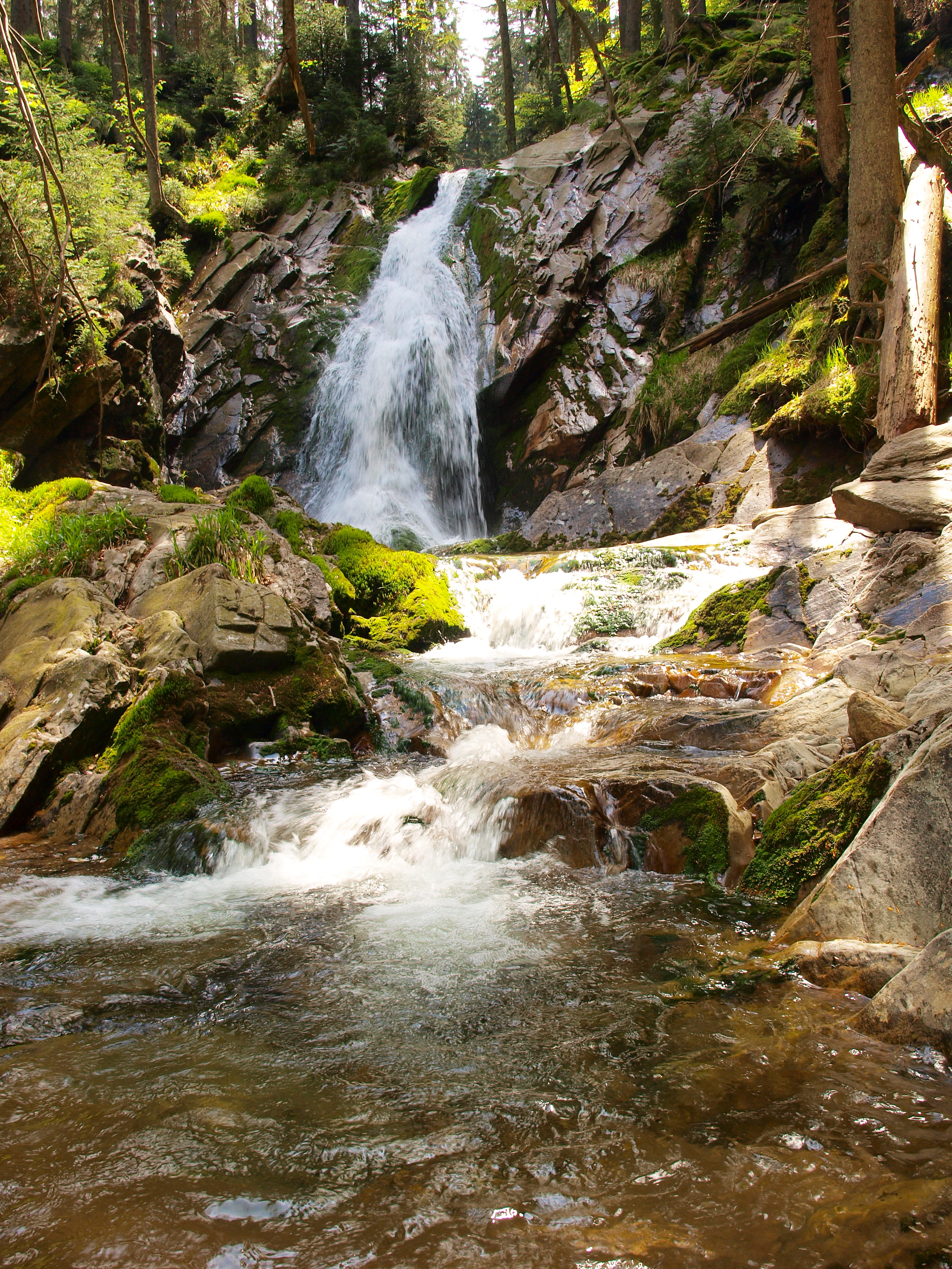 Bílý vodopád v oblasti Bílá strž je přírodní útvar o výšce 13 m, který je na Bílém potoce v blízkosti Černého jezera